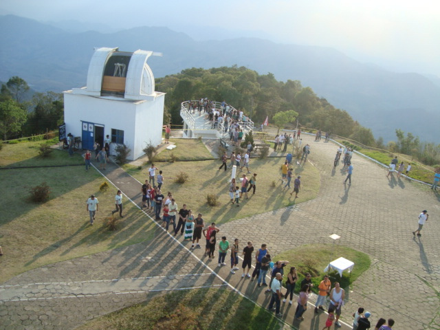 Dia de visitação ao Observatório Pico dos Dias (1/10/2011) em Itajubá, Brasil. Fila para entrar na cúpula do telescópio de 1,6m. Foto tirada da passarela desse telescópio.